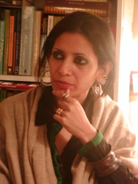 Angana P. Chatterji